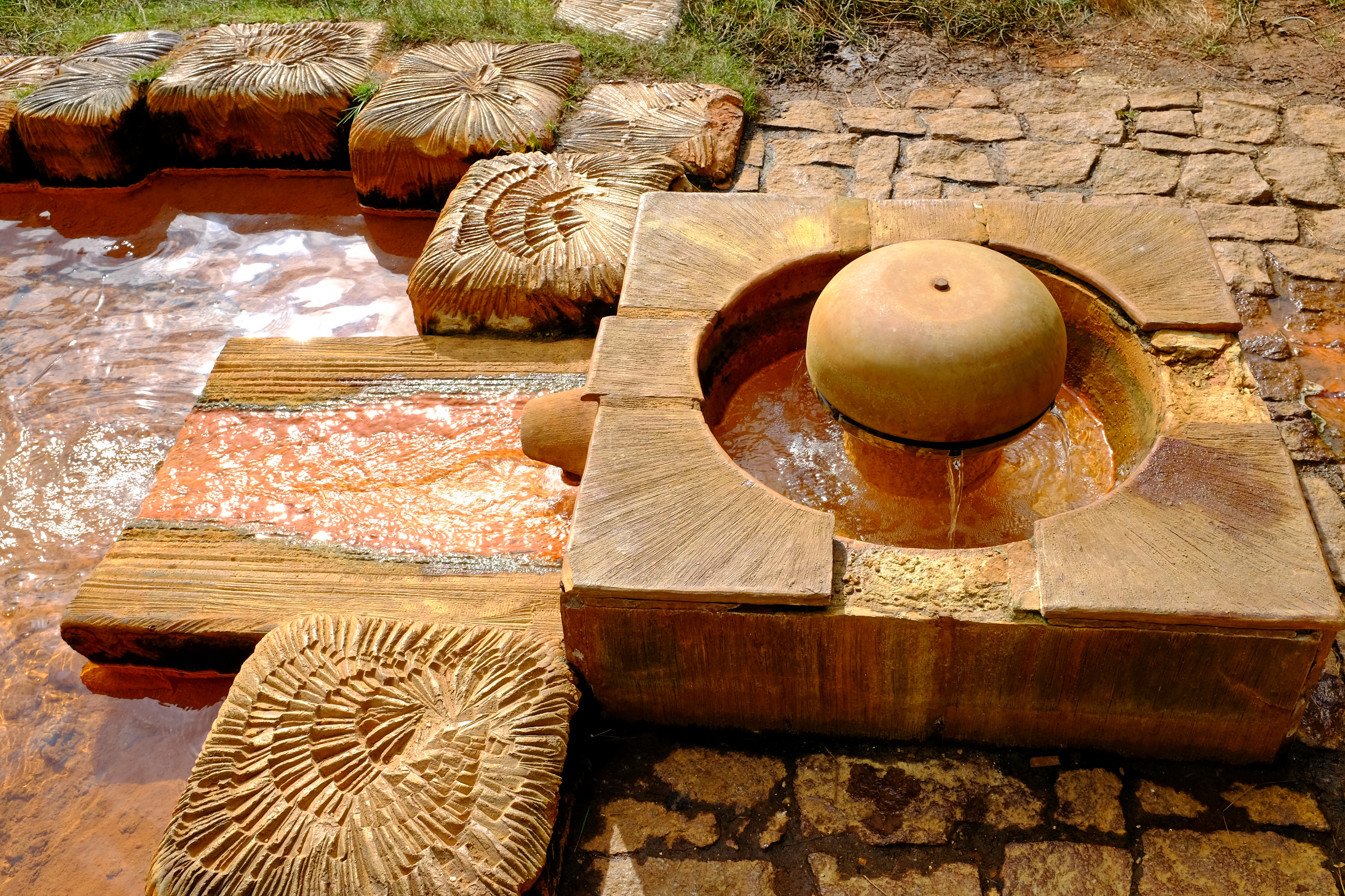 Přírodní rezervace Soos, Císařský pramen, okres Cheb